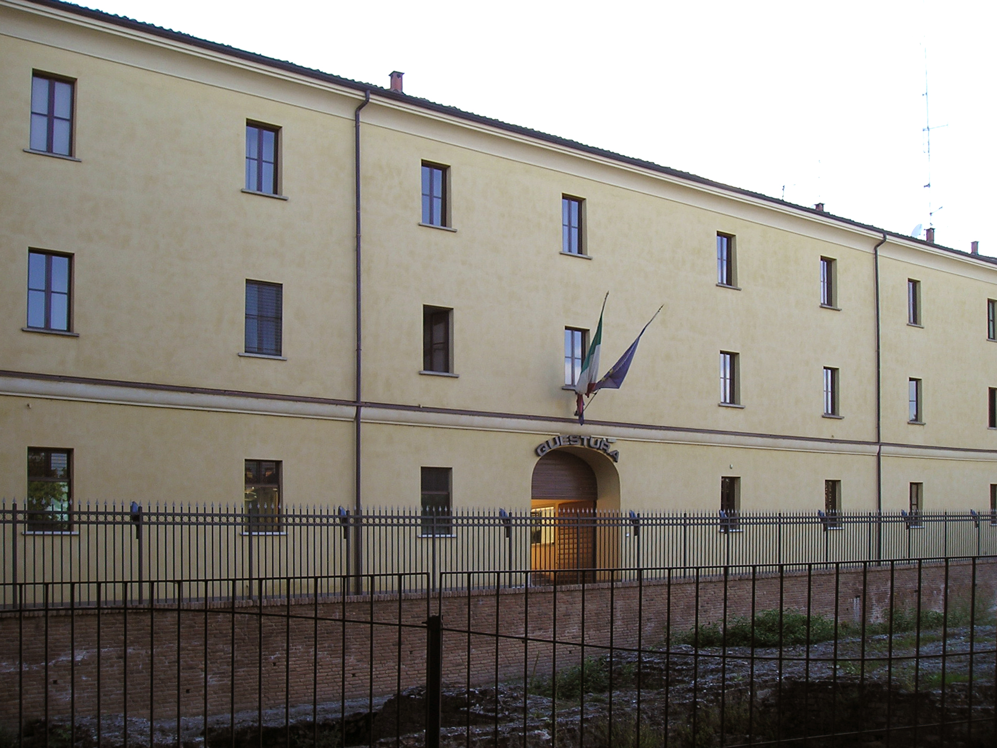 Castello (ora sede della Questura) a Lodi